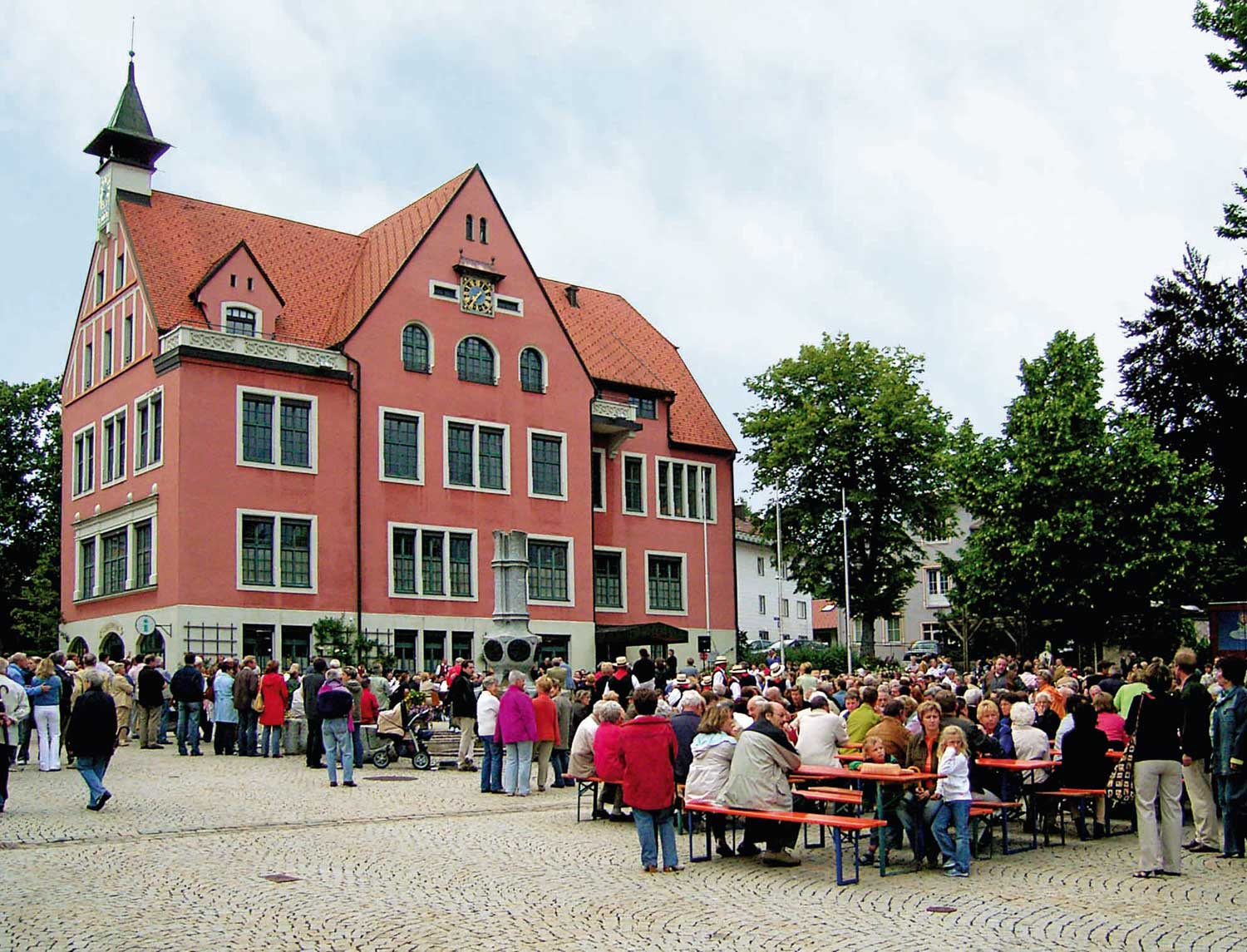 Lindenberg im Allgäu, Stadtplatz mit Brunnen